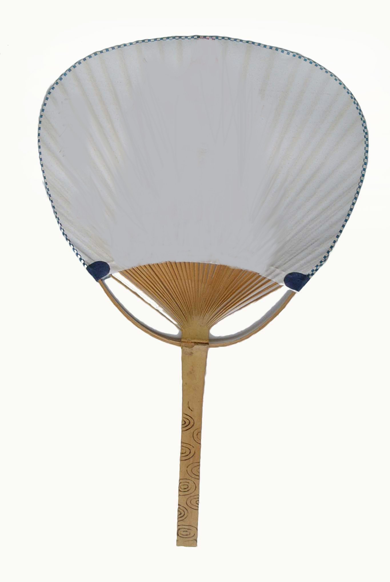 Uchiwa, photo taken in Japan